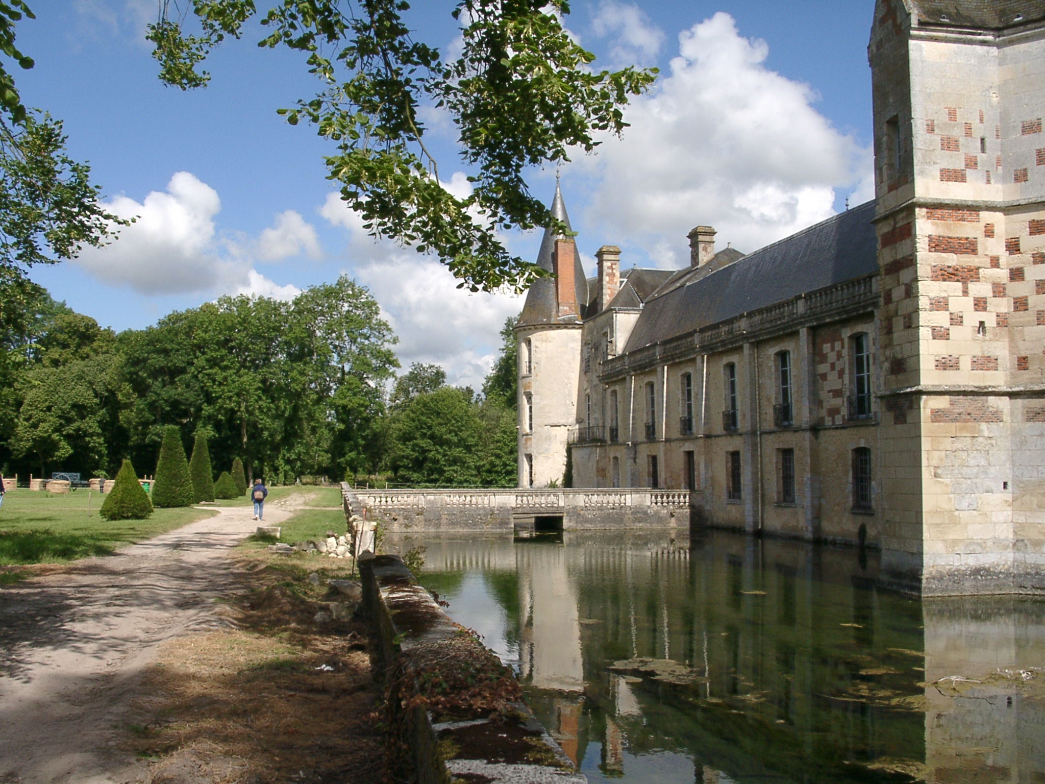 16e s.